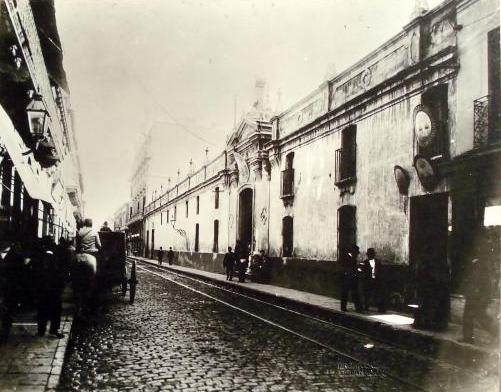 Edificio de la Asistencia Pública que funcionaba en la calle Esmeralda 80. Antes había sido Hospital de Mujeres. Demolido en los años '30, hoy es la Plaza Roberto Arlt. Buenos Aires, Argentina.